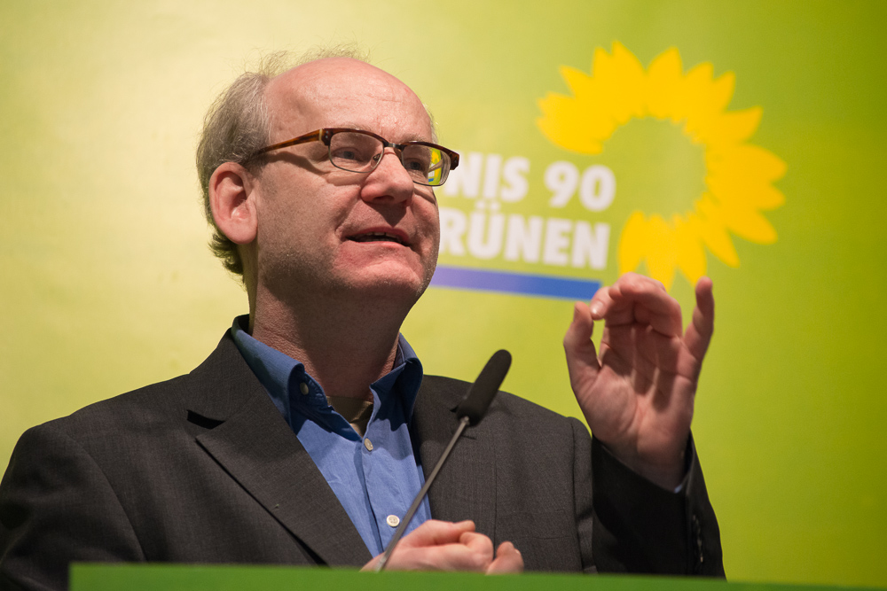 Johannes Lichdi, Mitglied des Sächsischen Landtages